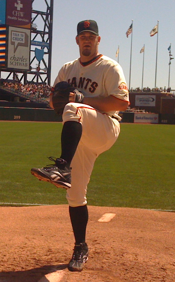 Brad Penny